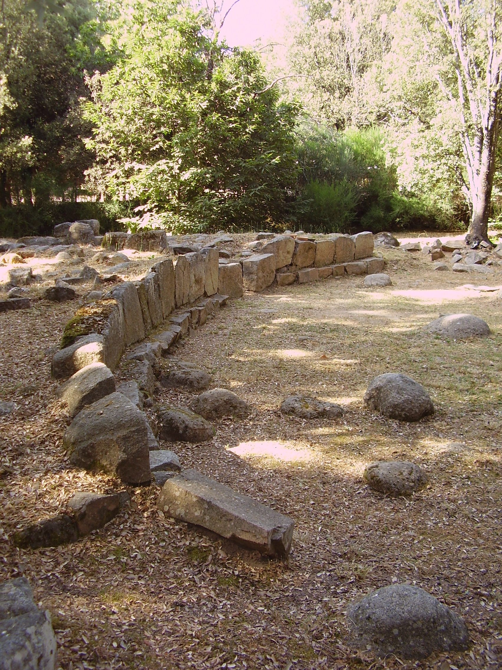 Monumento funebre - Età Nuragica- Seleni I, XV-XIV sec. a.C. - Vista laterale This is a photo of a monument which is part of cultural heritage of Italy.